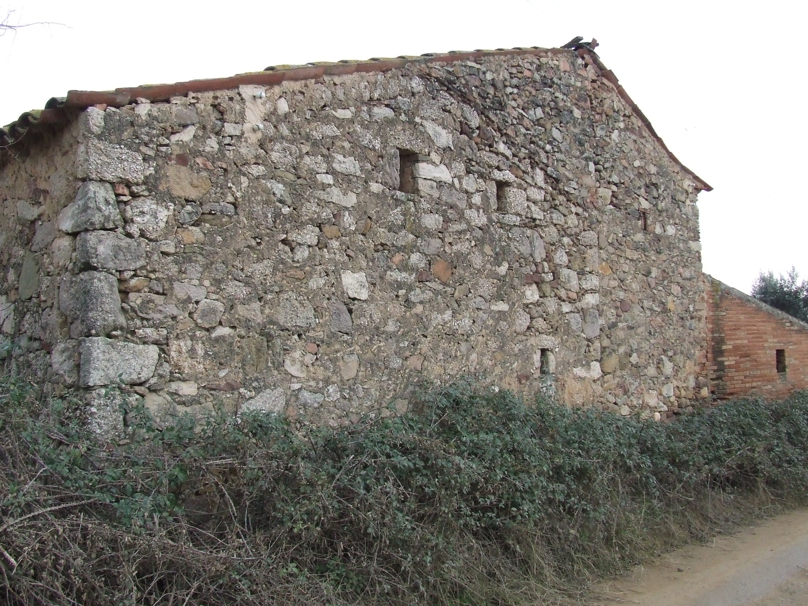 Can Lluís del Pla (Bigues, Bigues i Riells, Vallès Oriental)